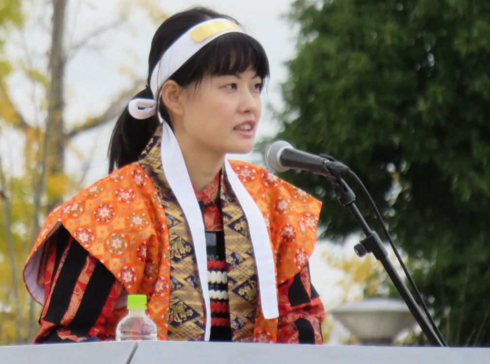 将棋棋士の村田智穂（平成27年11月28日、姫路市で行われた人間将棋にて）